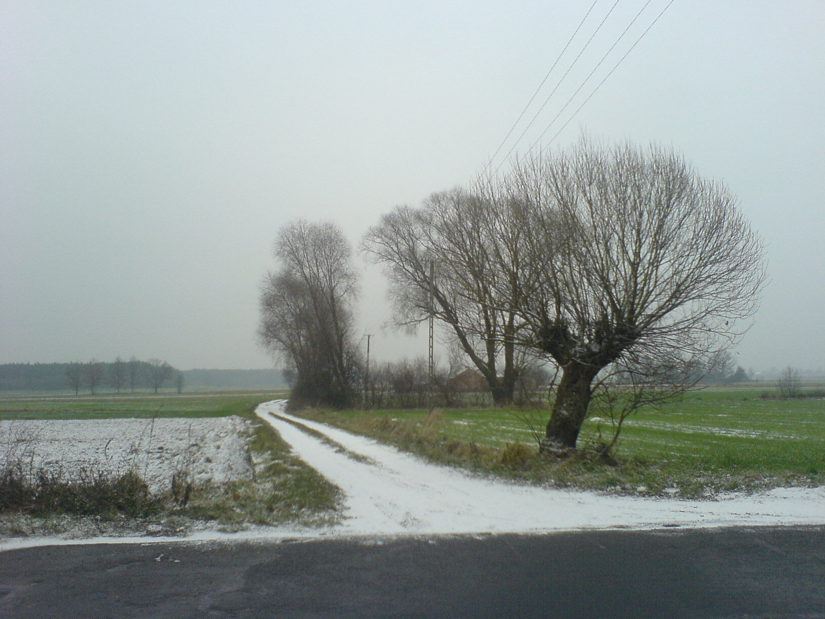 Wieś Owieczki (województwo łódzkie), osada Dunaje, droga w kierunku osady Leśniki.